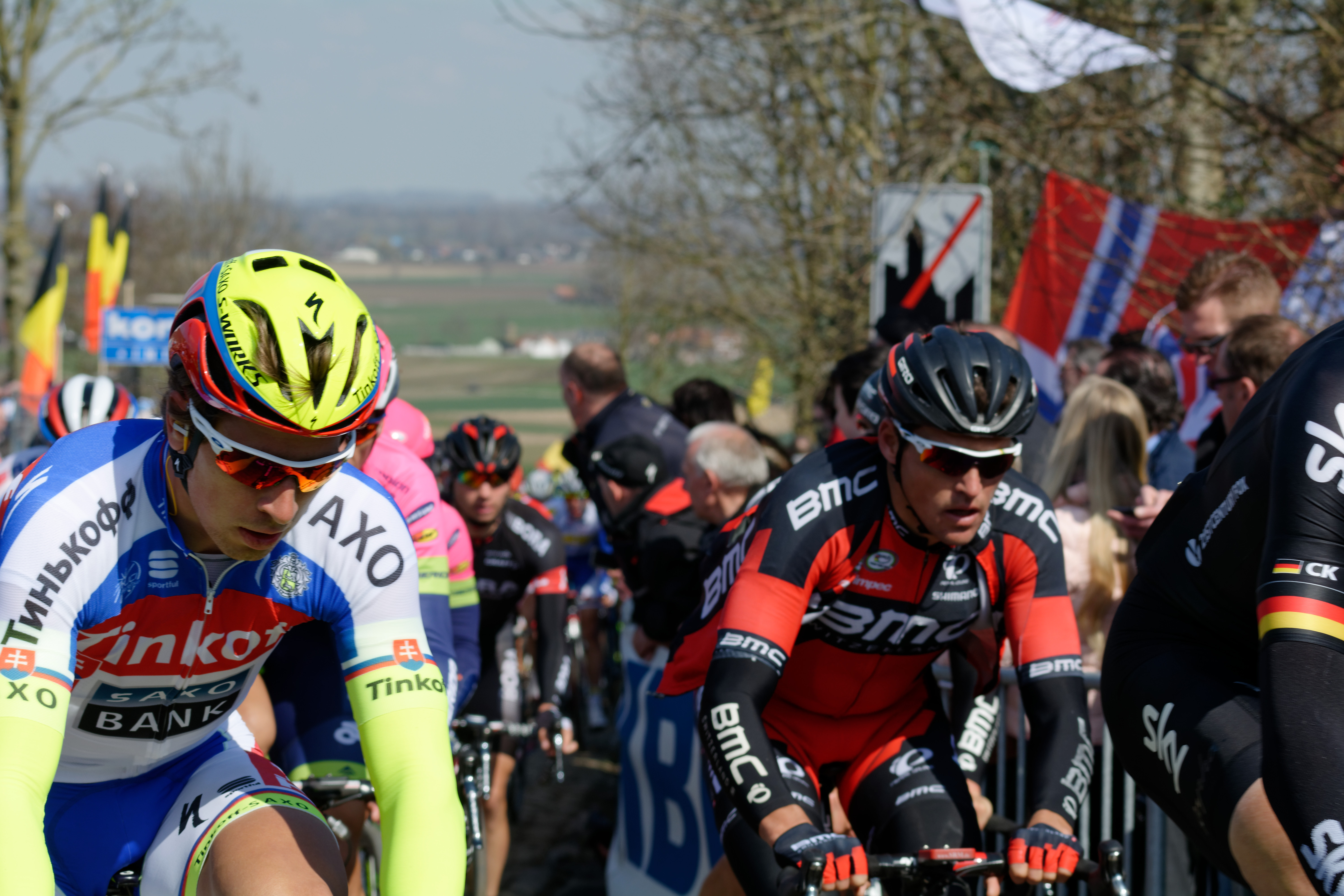 D71_6282_DxO